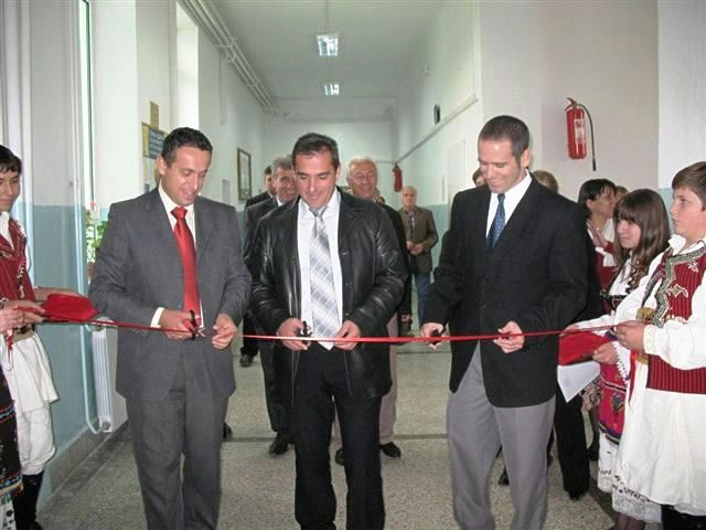 Советникот за односи со јавност на американската амбасада во Скопје, Рајан Роуландс, заедно со градоначалникот на општина Сопиште и со директорот на основното училиште „Драга Стојановска“ од Ракотинци го одбележуваат реновирањето на училиштето.